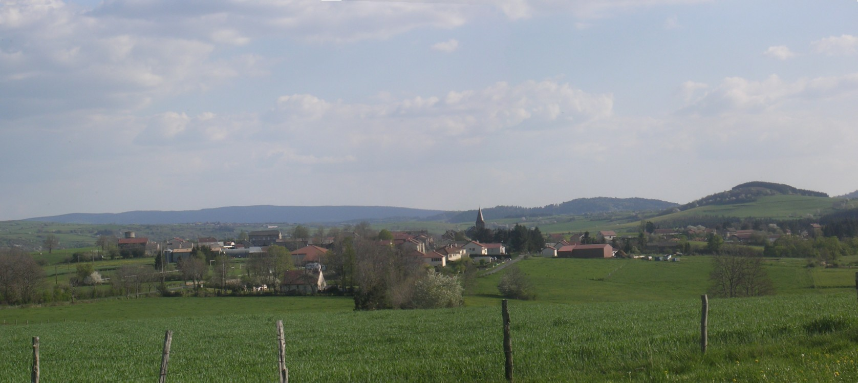 La Chapelle Laurent (Cantal)